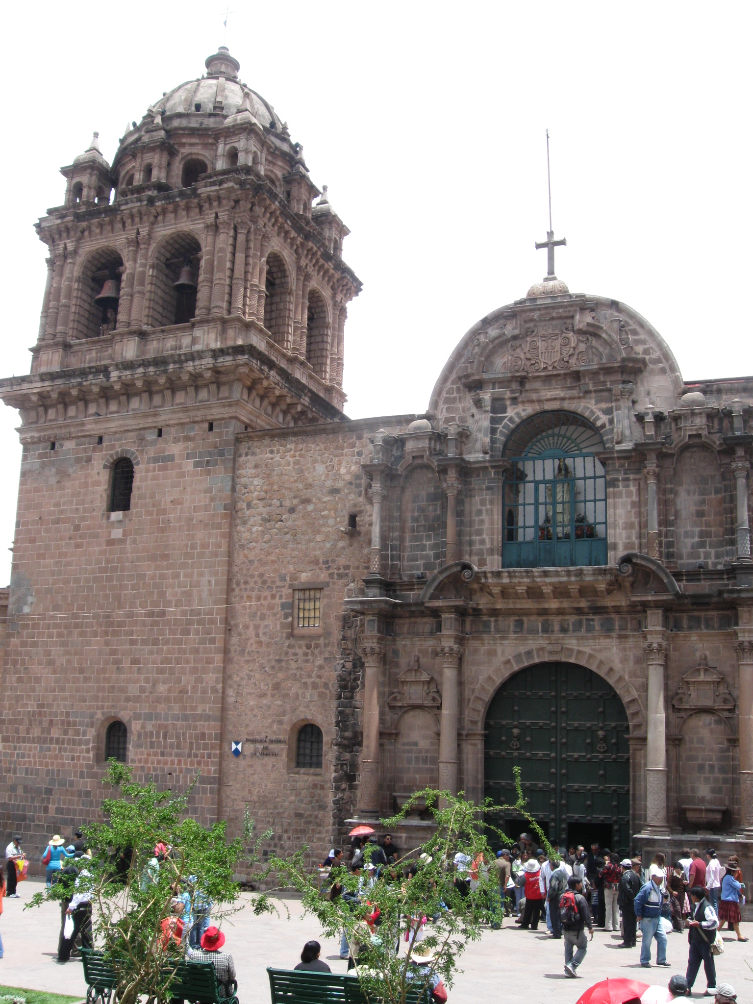 Vista parcial de la Basilica Menor La Merced